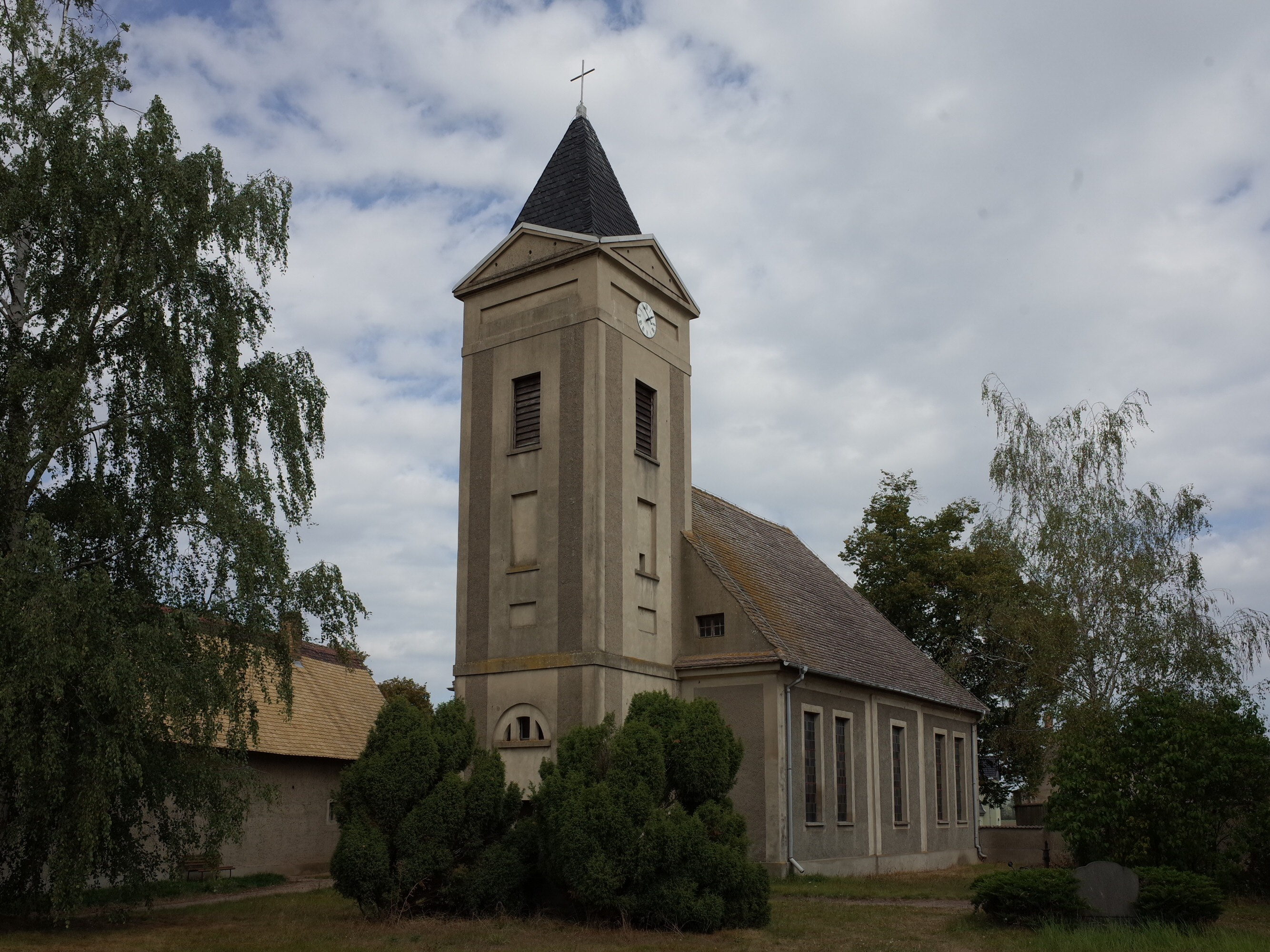 Zörbig, Ortsteil Wadendorf, Fünf-Brüder-Kirche (Baudenkmal im Denkmalverzeichniss Sachsen-Anhalt, Erfassungsnummer: 094 80079 000 000 000 000 [1])